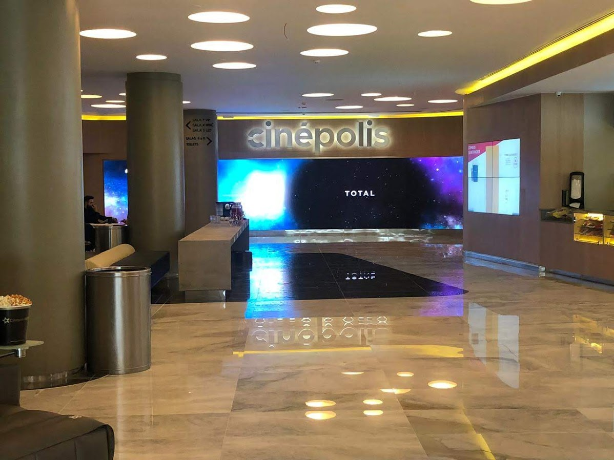 Foyer do Cinépolis JK Iguatemi após a reforma.